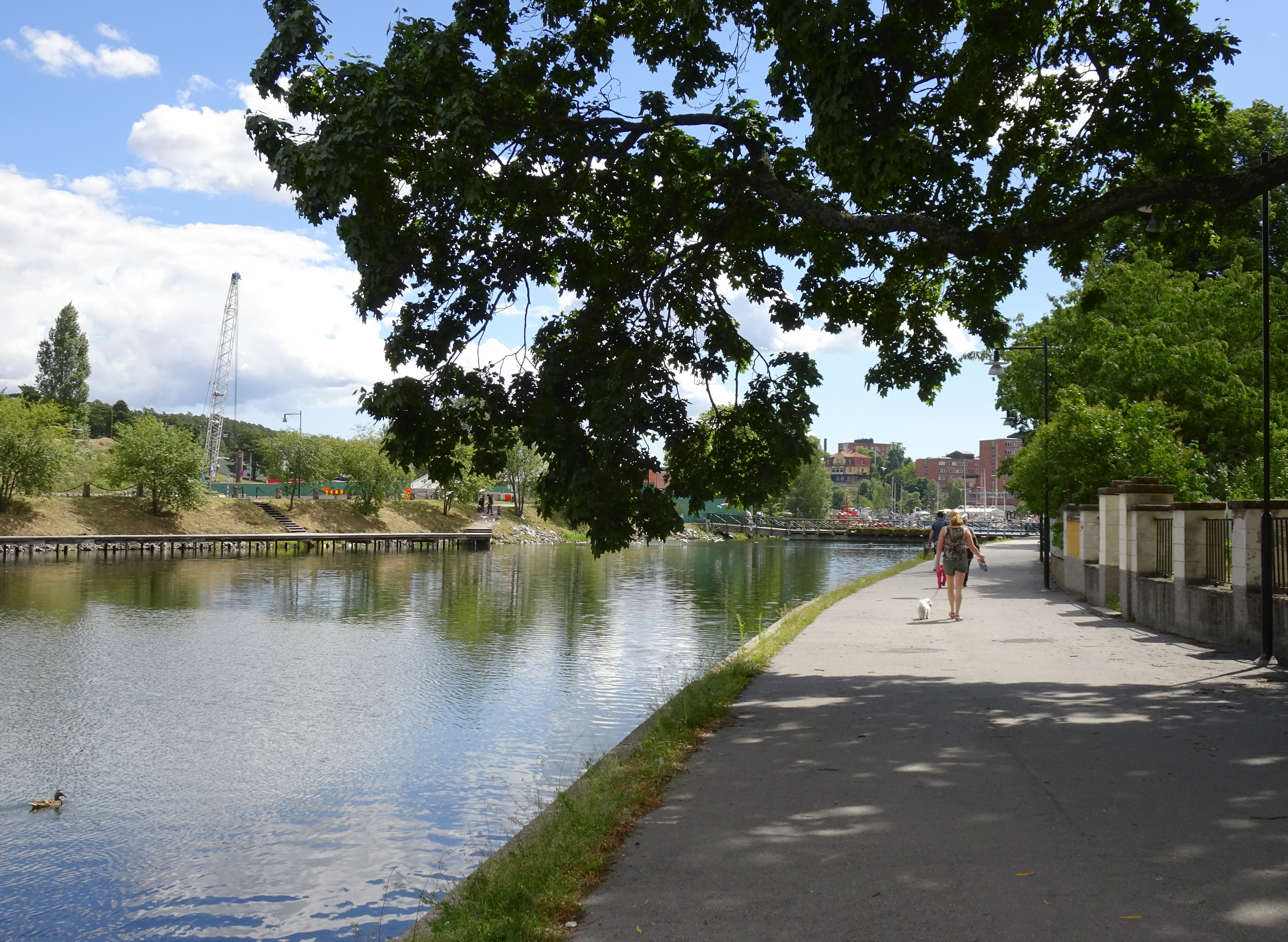 trandgatan, Södertälje, mot syd